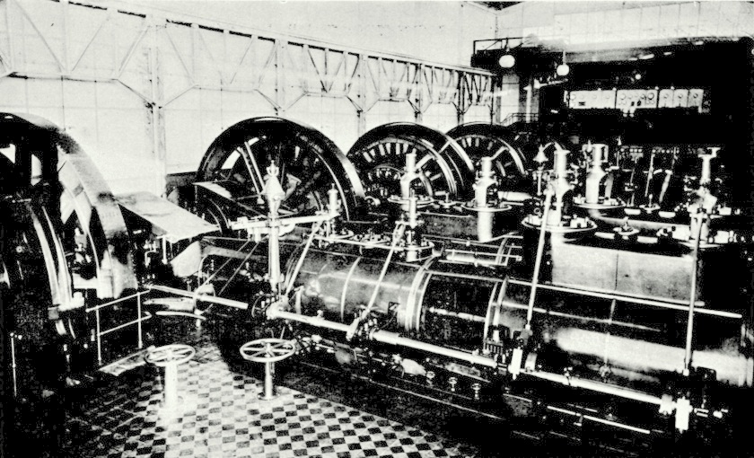 Imagen en Chile descripción física, política, social industrial y comercial de la República de Chile, por Carlos Tornero.1903